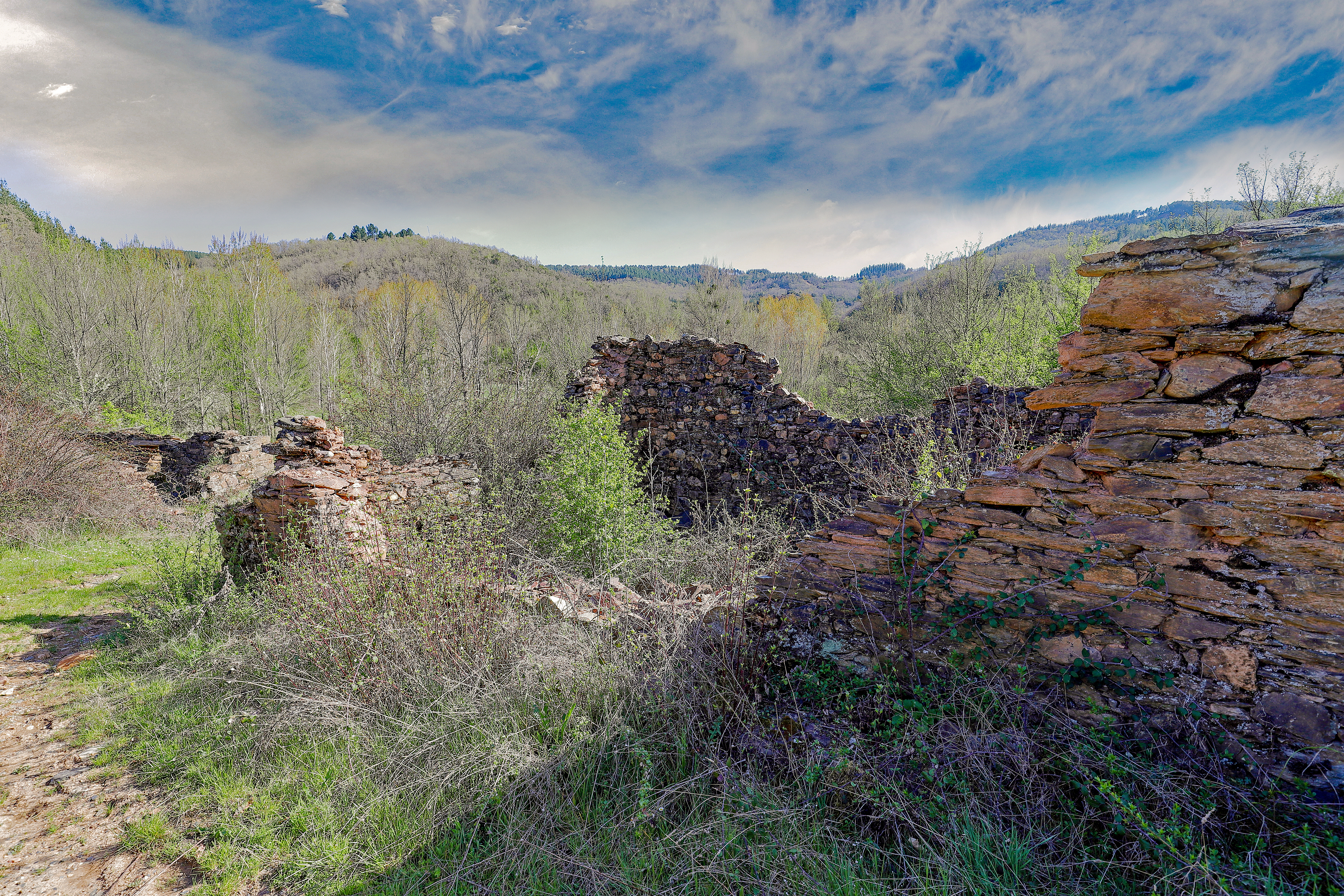 Castellanos es un despoblado que pertenece al municipio de Berlanga del Bierzo en la comarca de El Bierzo, provincia de León.